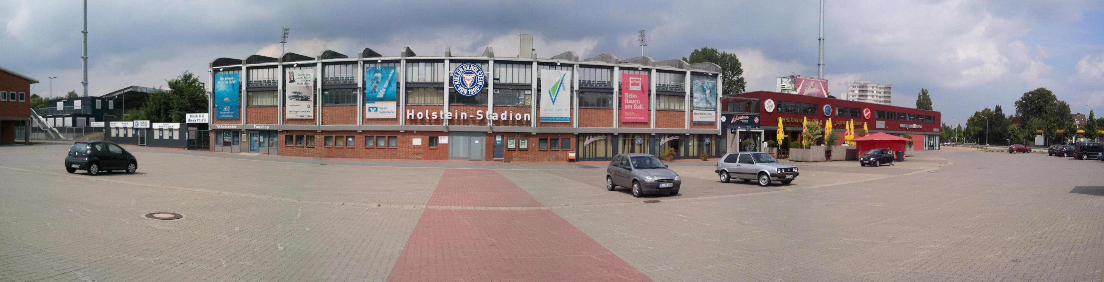 Holstein-Stadion: Parkplatz und Hauptribüne